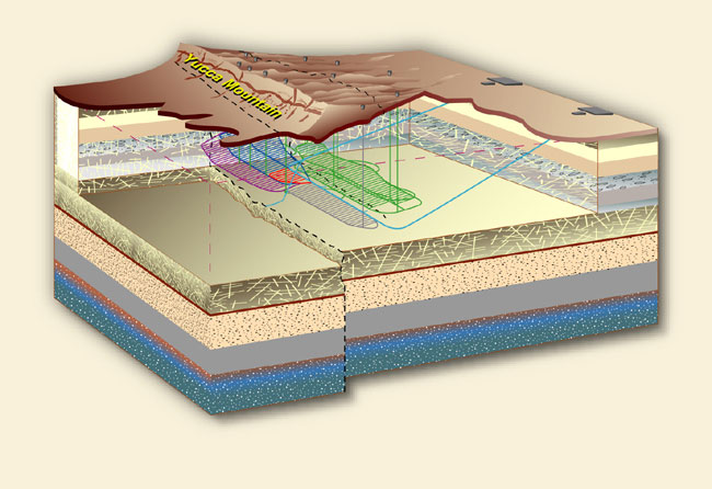 Coupe géologique de l'environnement du projet Yucca Mountain